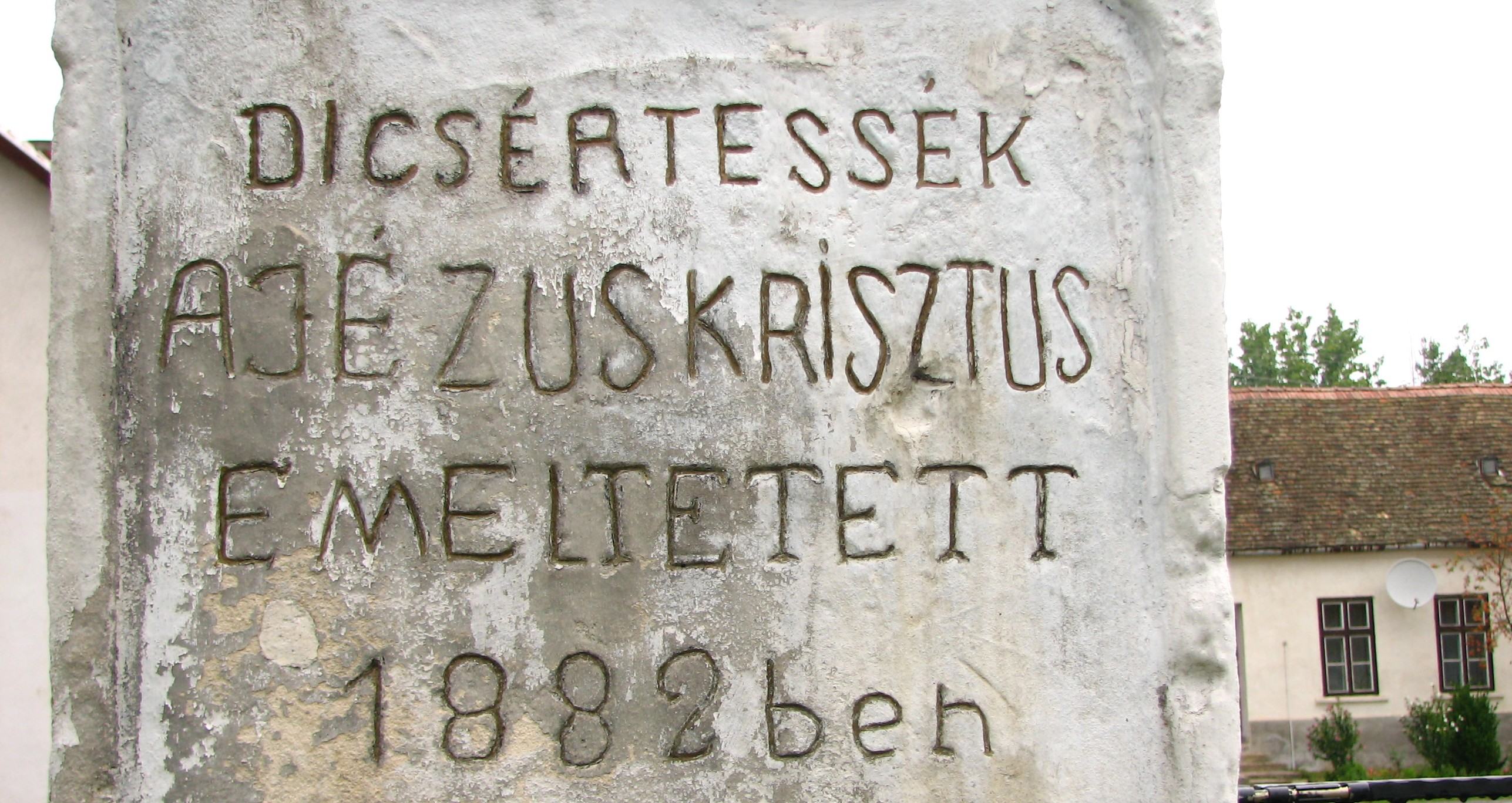 A község közepén, a kultúrház és a Polgármesteri Hivatal előtt álló emlékkereszt kerítéssel van körülvéve (Kisszőlős, Veszprém megye)